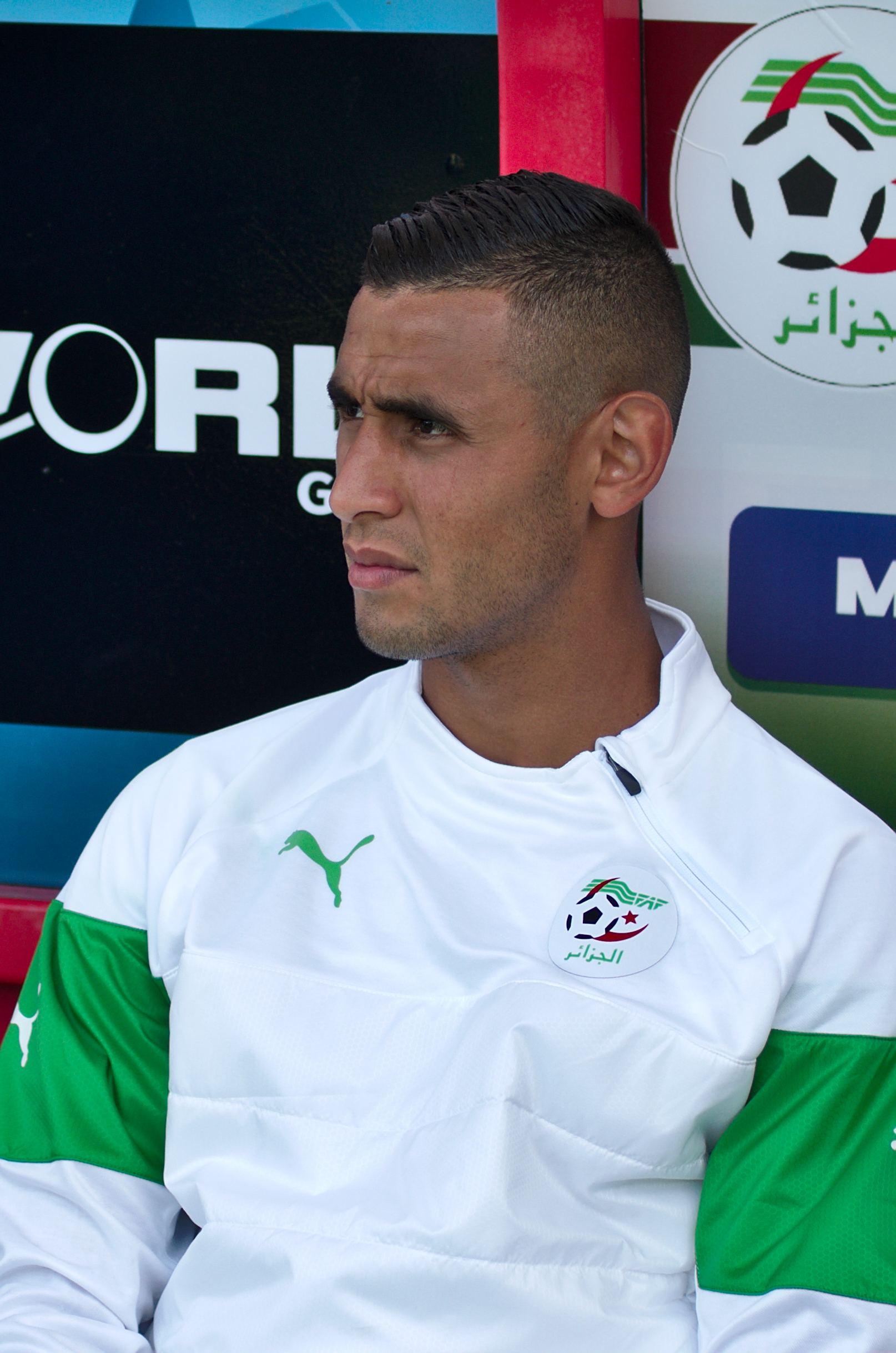 Algérie - Arménie - 20140531 - Faouzi Ghoulam